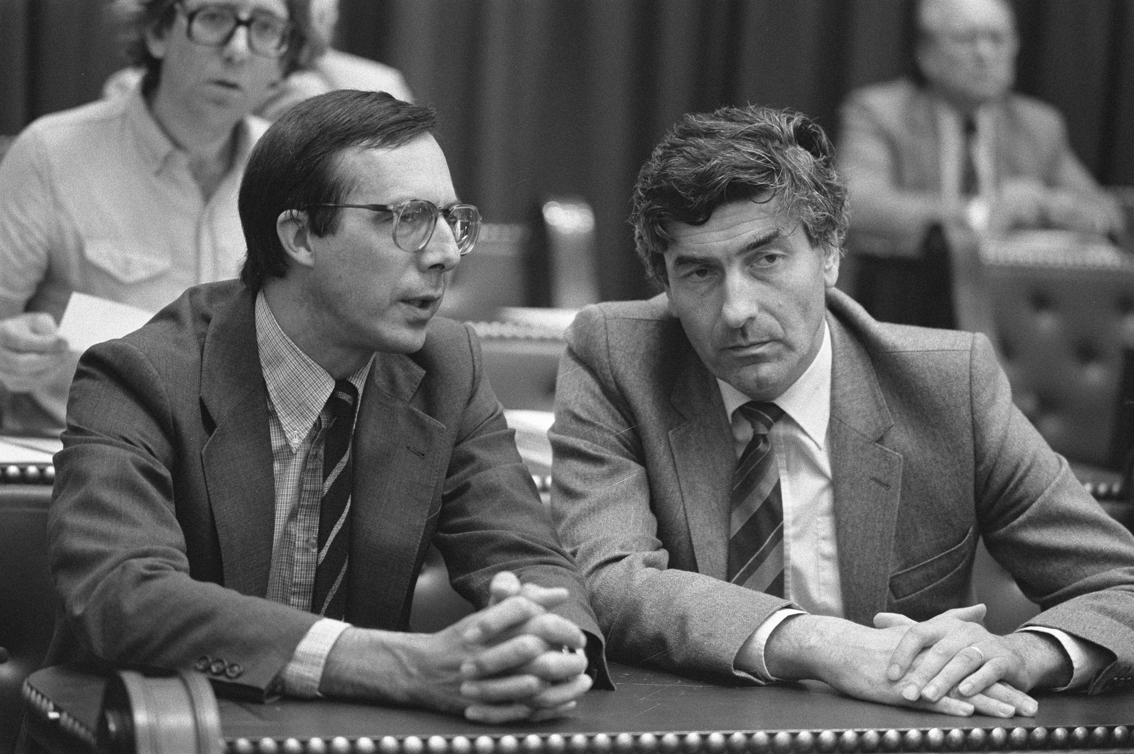 Collectie / Archief : Fotocollectie Anefo Reportage / Serie : [ onbekend ] Beschrijving : Tweede Kamer , debatten; Brinkhorst (D66) links in gespr met Lubbers (CDA) Datum : 9 juni 1982 Trefwoorden : debatten Fotograaf : Bogaerts, Rob / Anefo Auteursrechthebbende : Nationaal Archief Materiaalsoort : Negatief (zwart/wit) Nummer archiefinventaris : bekijk toegang 2.24.01.05 Bestanddeelnummer : 932-2045